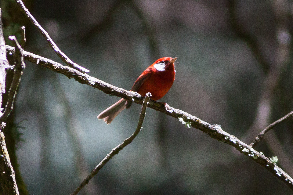 Volcan de Nieve, Colima